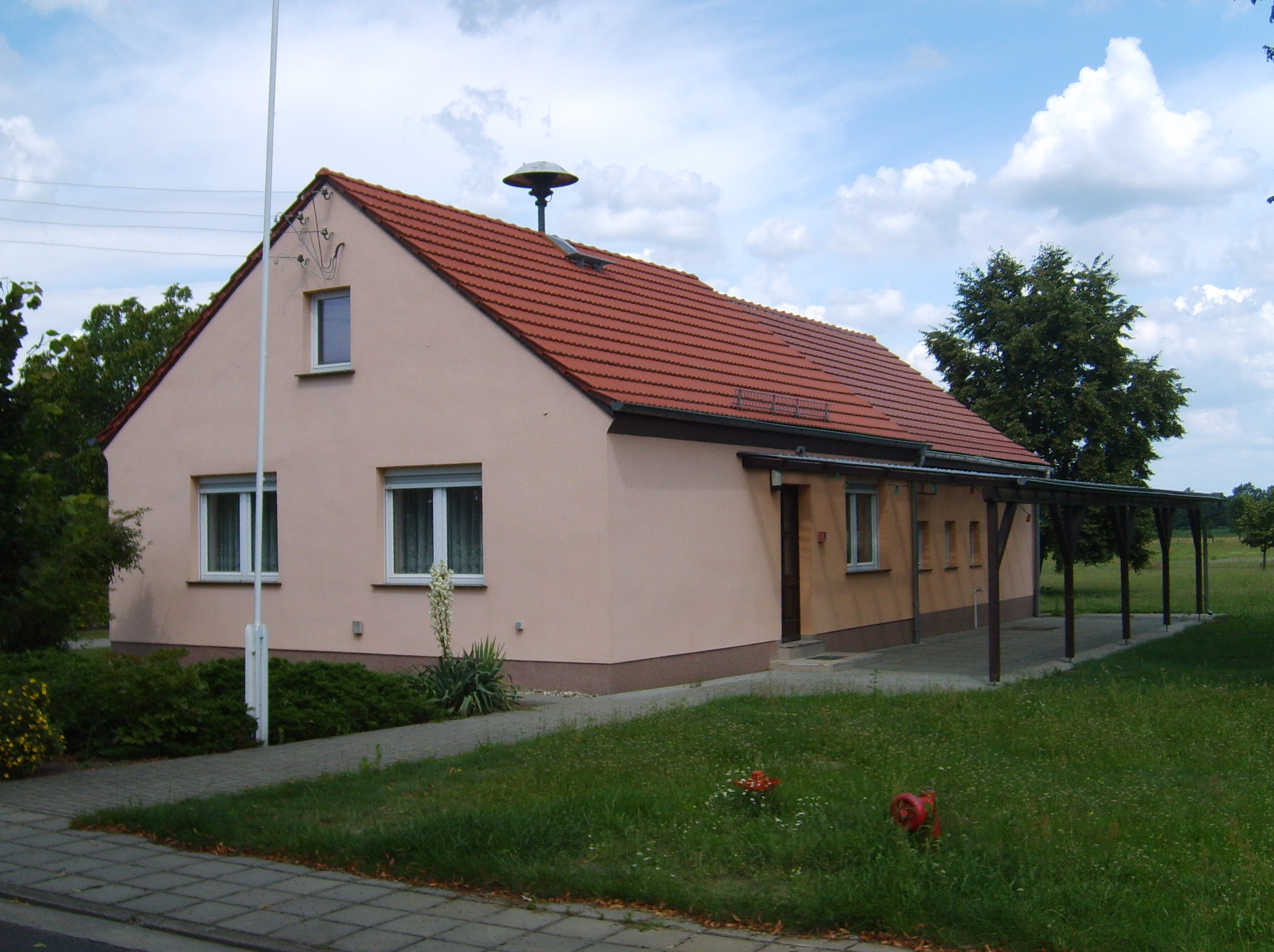 Würdenhain